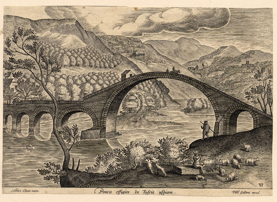 Pontis effigies in Tuscia uspiam; Kupferstich, um 1575